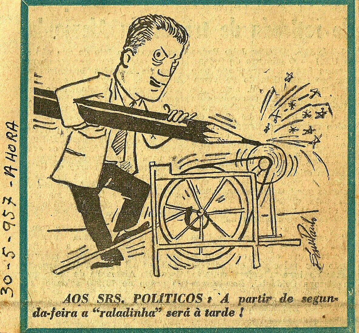 Charge do cartunista e chargista Sampaulo (Paulo Brasil Gomes de Sampaio) publicada no jornal A Hora, em 1957.